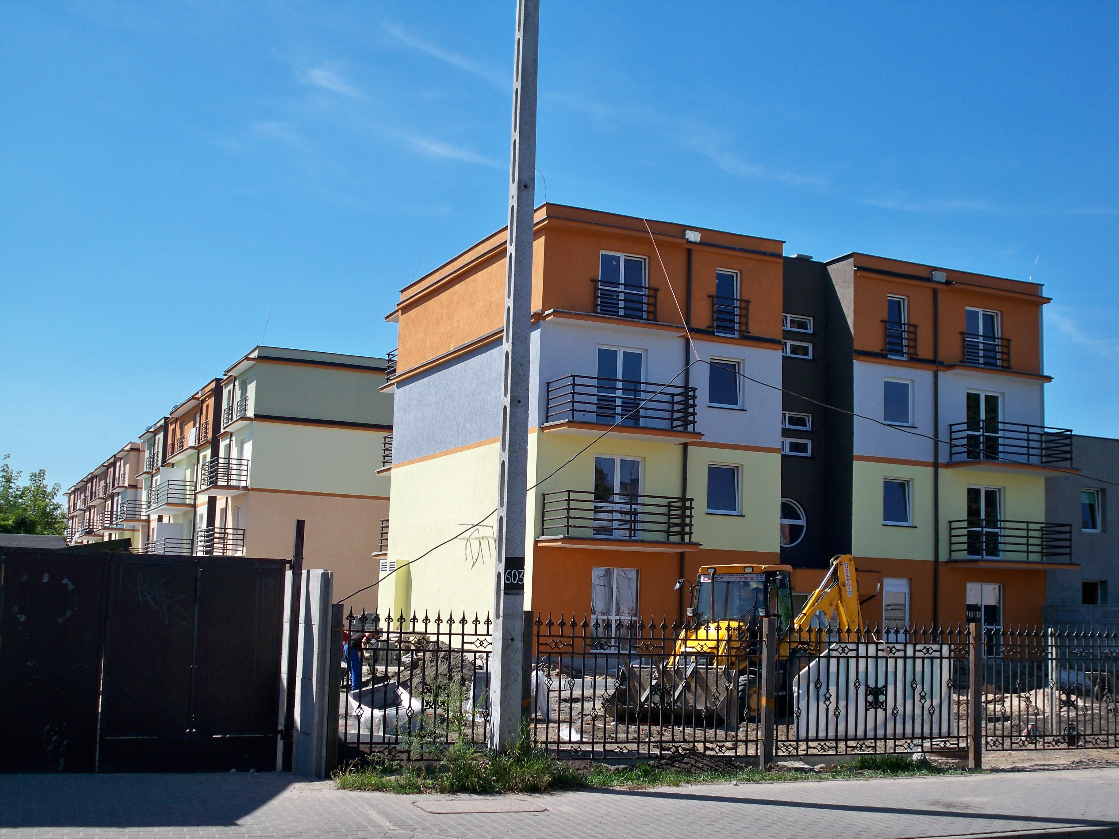 Nowy blok przy ul. Stodólnej 11D (2009 r.).